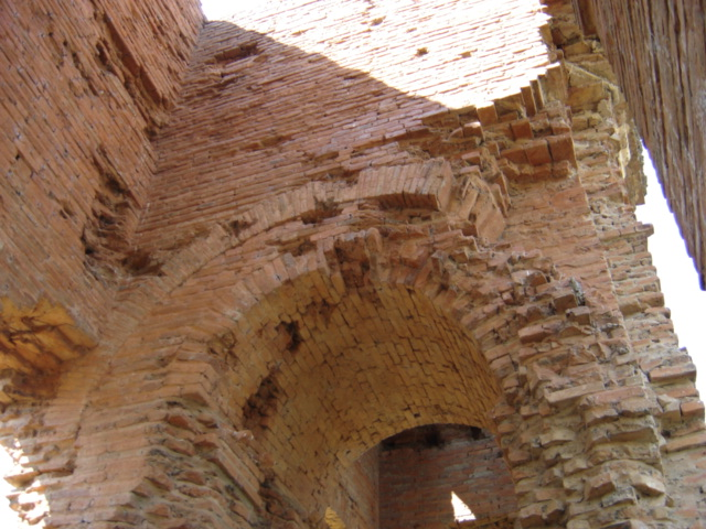 Ruinas de Humaita, en el sur del paraguay